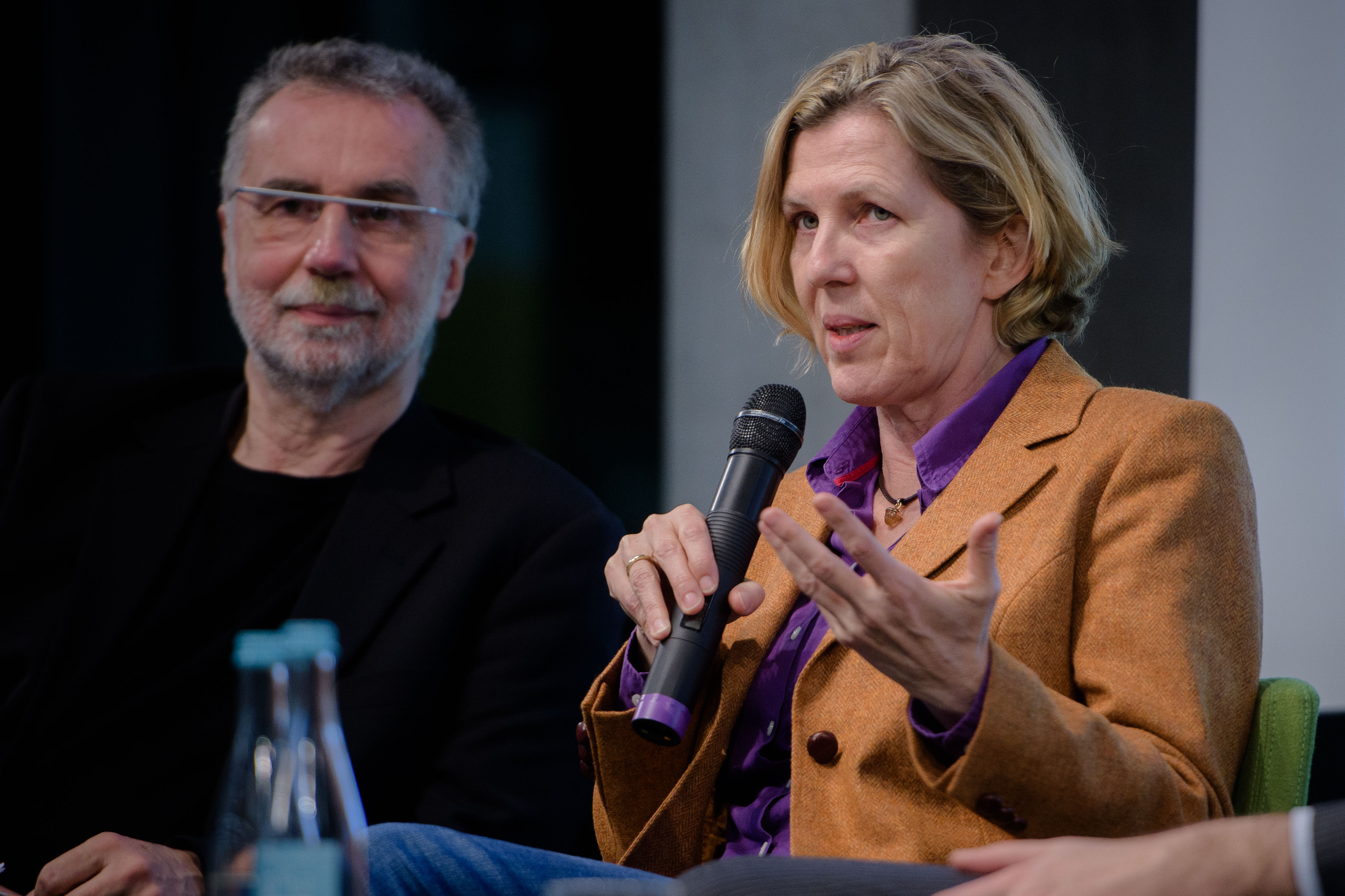 Dr. Jochen Hippler (Privat Dozent, Institut für Entwicklung und Frieden, Univ. Duisburg-Essen), Dr. Sylke Tempel (Chefredakteurin Internationale Politik, DGAP, Berlin) Foto: stephan-roehl.de